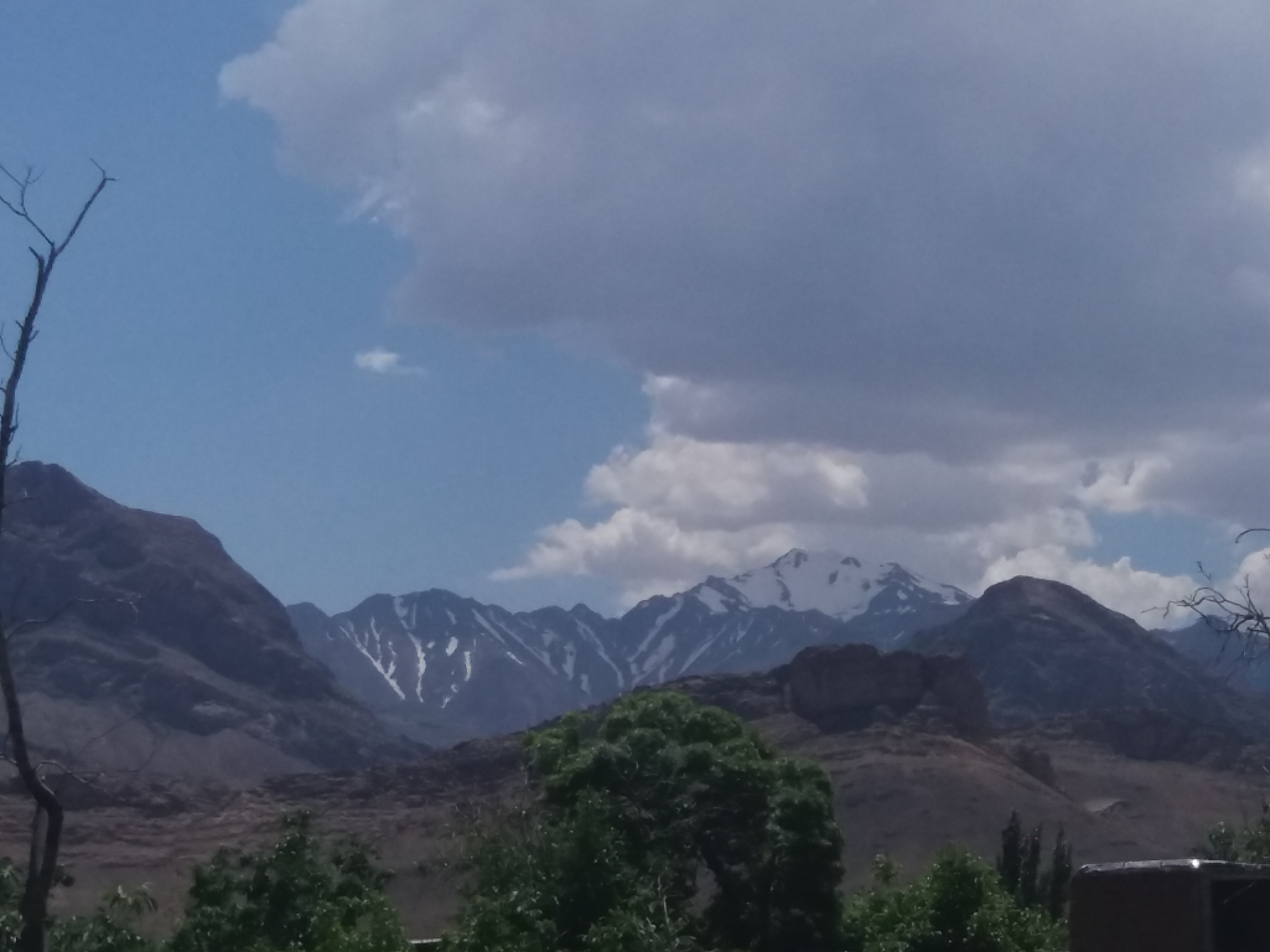 قله اردهال در خرداد۱۳۹۸